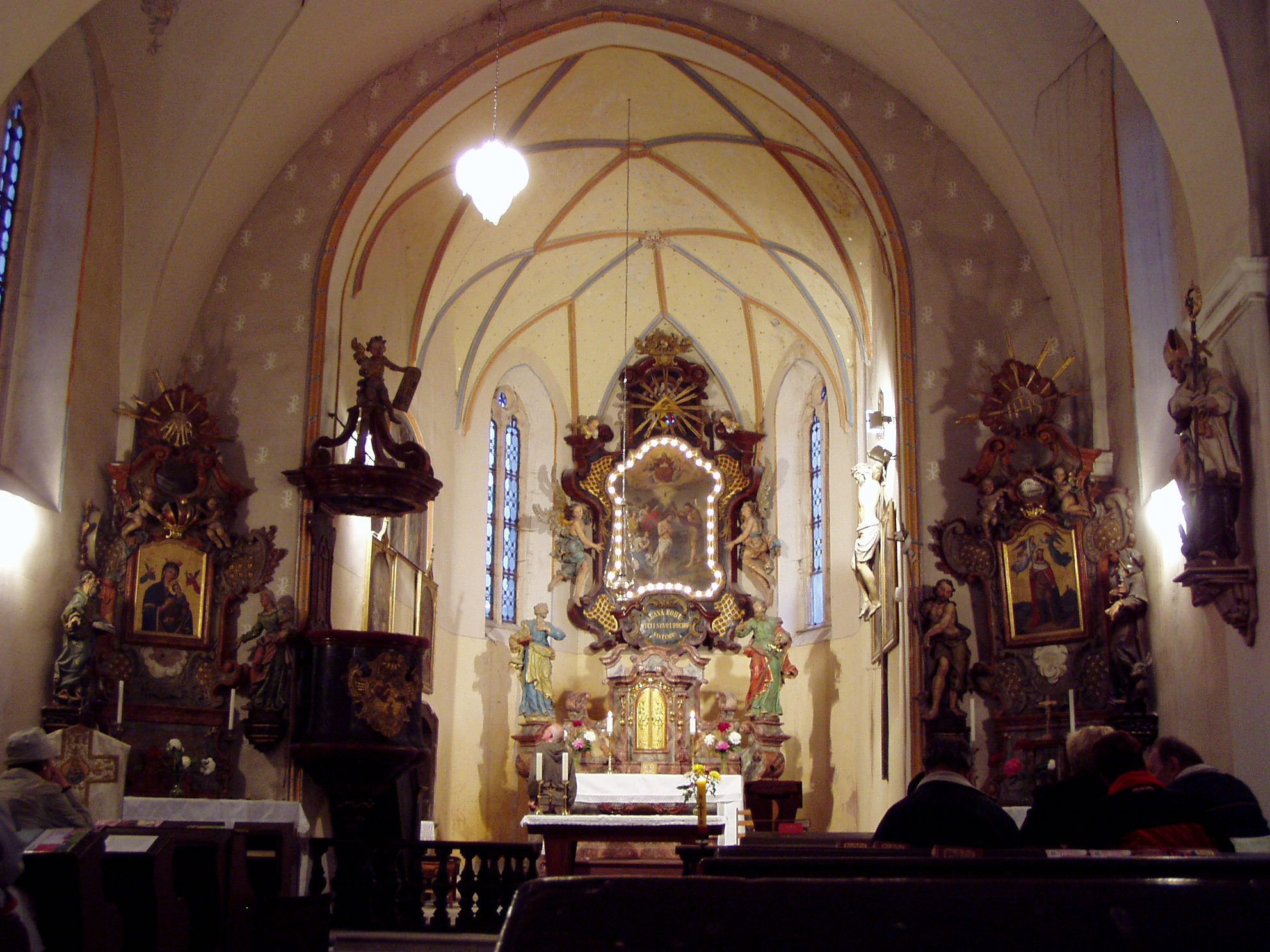 Interiér kostela svaté Trojice v Loukově (foceno při příležitosti Noc kostelů 2011)